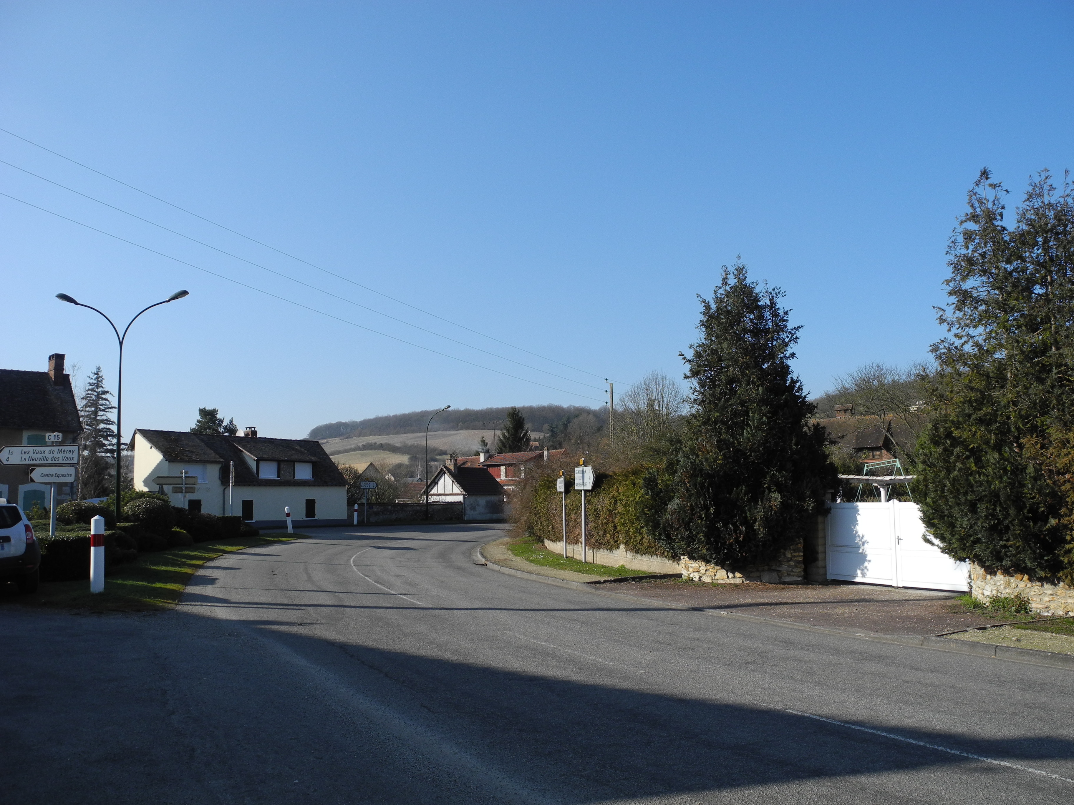 rue de Merey (Eure)